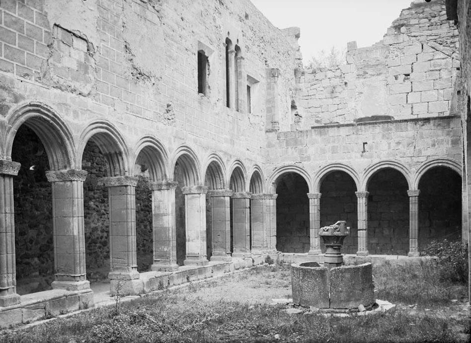 Imatge